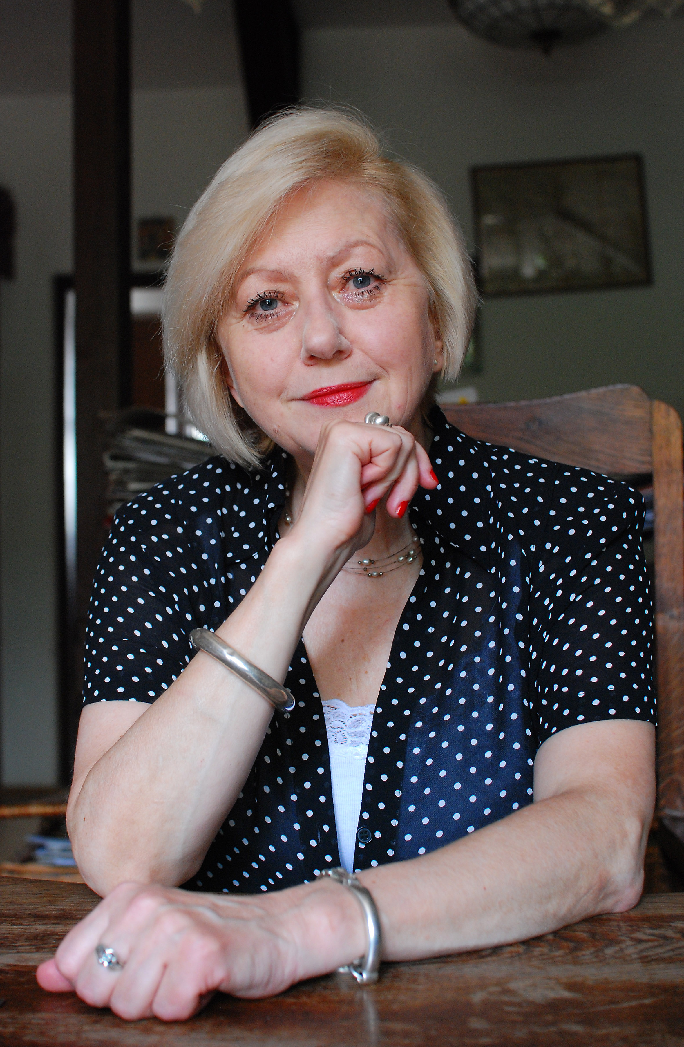 Joanna Siedlecka